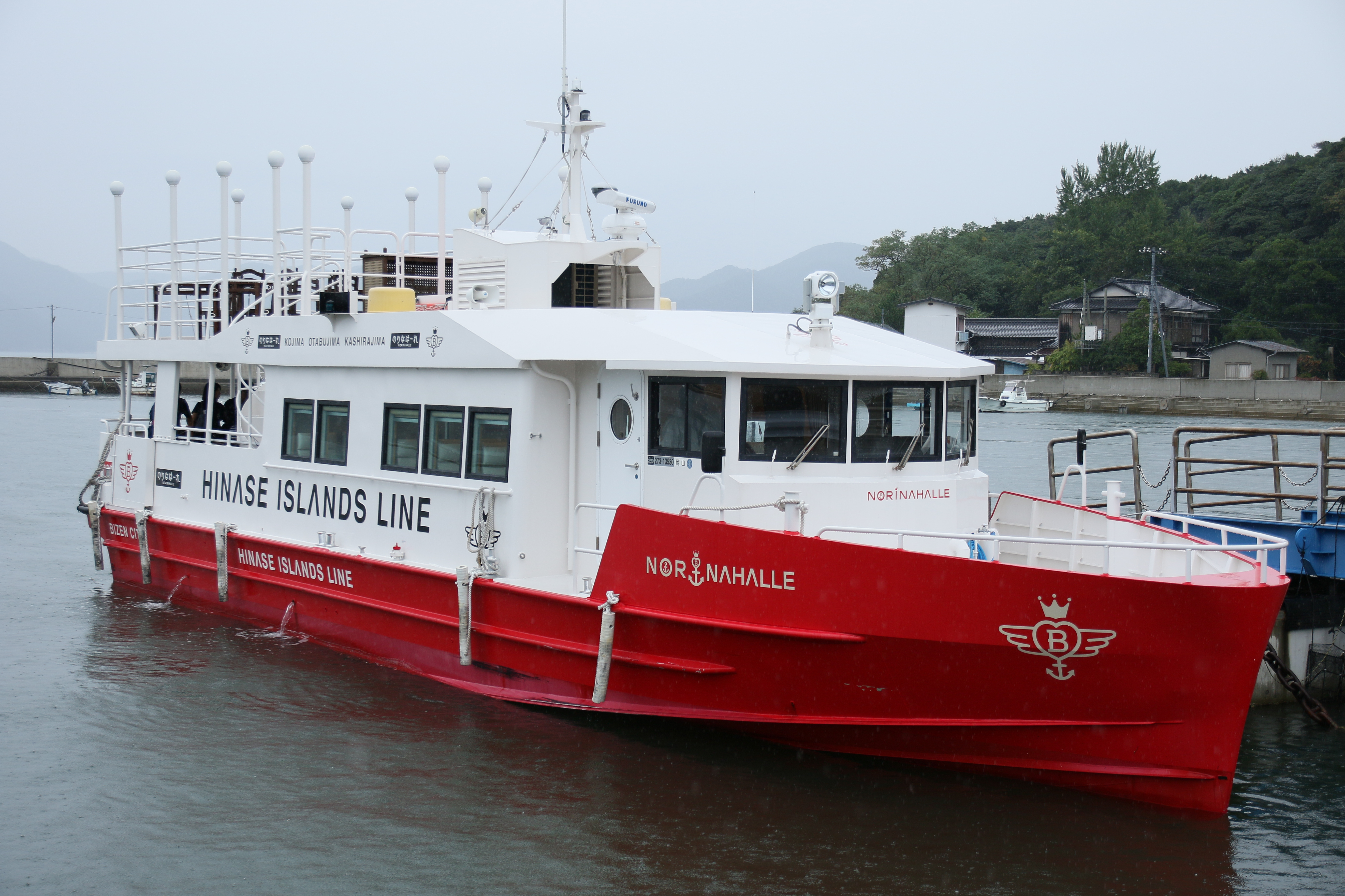 大生汽船のNORINAHALLE（のりなはーれ） 大多府港にて Canon EOS 7D Mark II